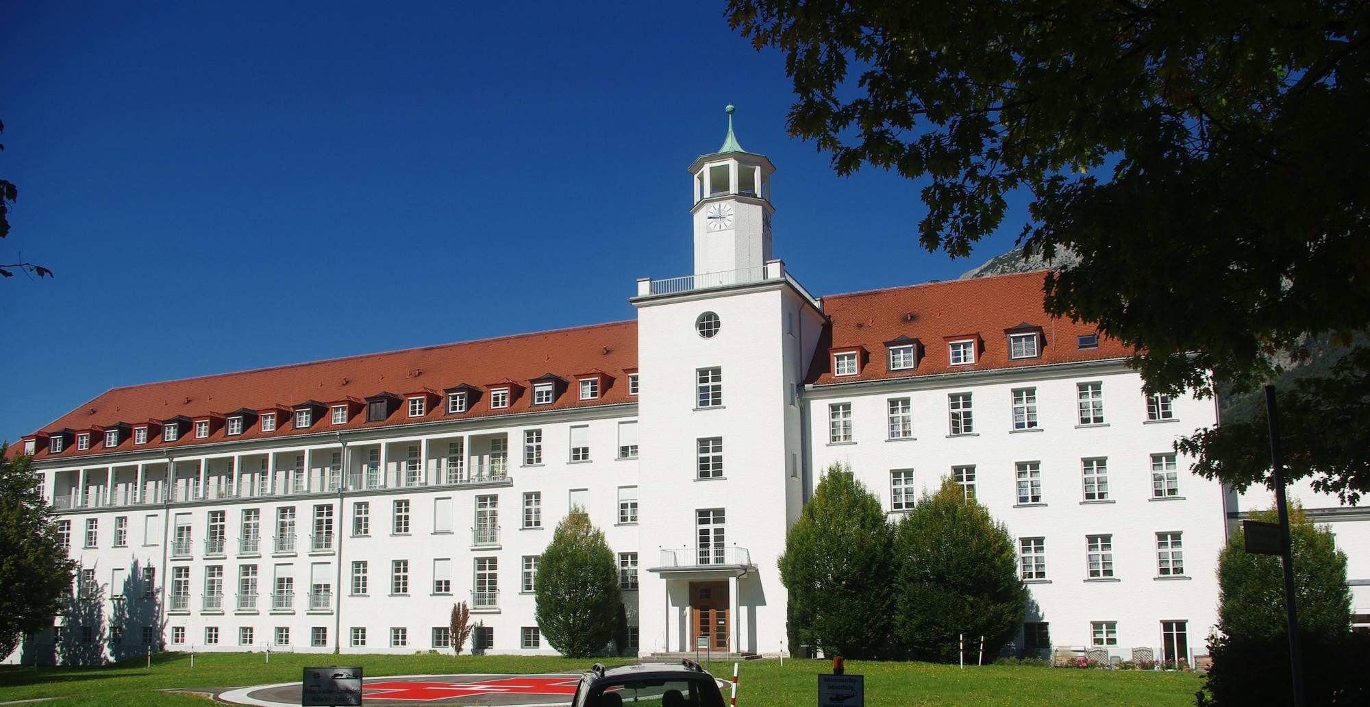 Ehemaliges Städt. Krankenhaus ("Schachnerbau") in 83435 Bad Reichenhall